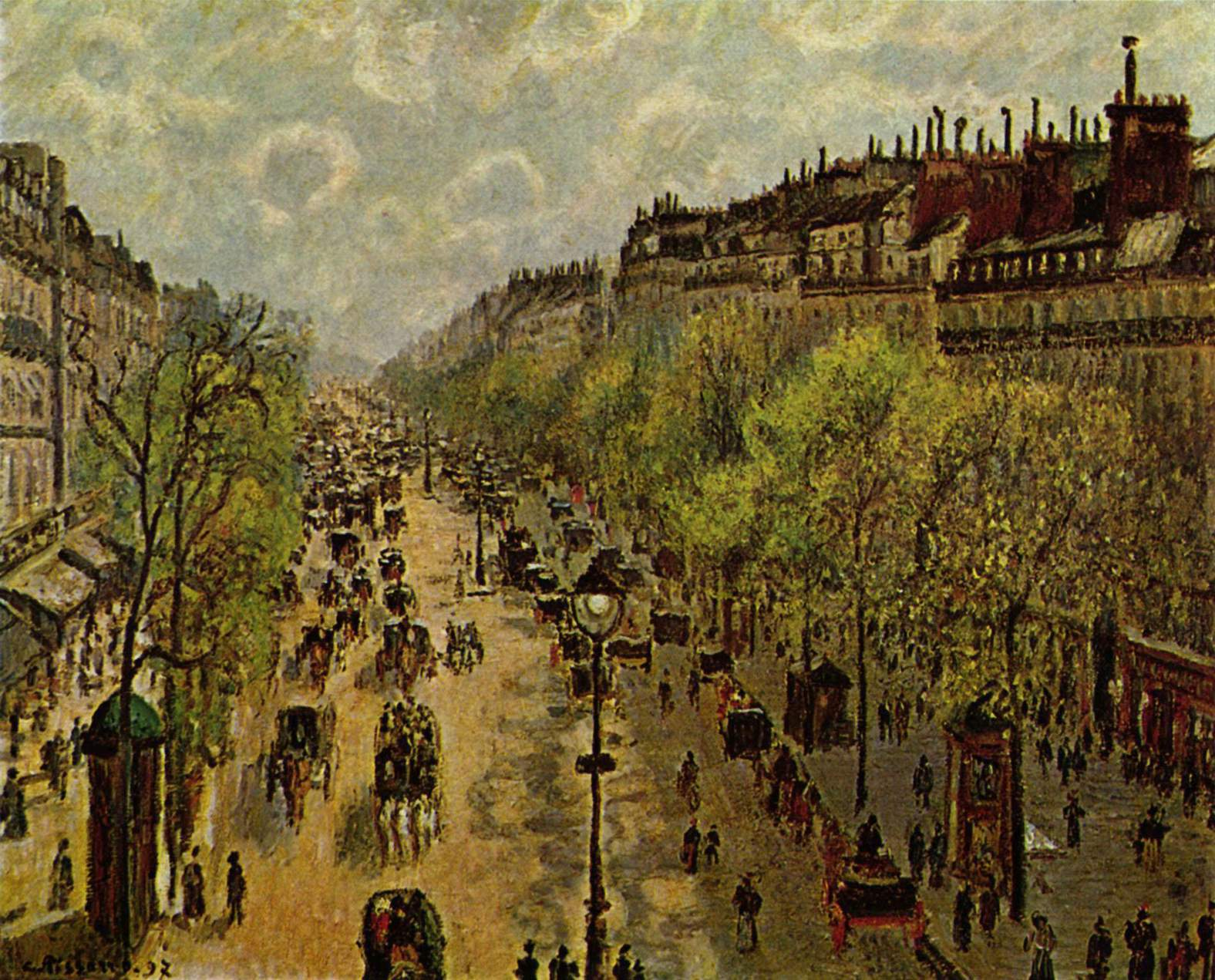 painting